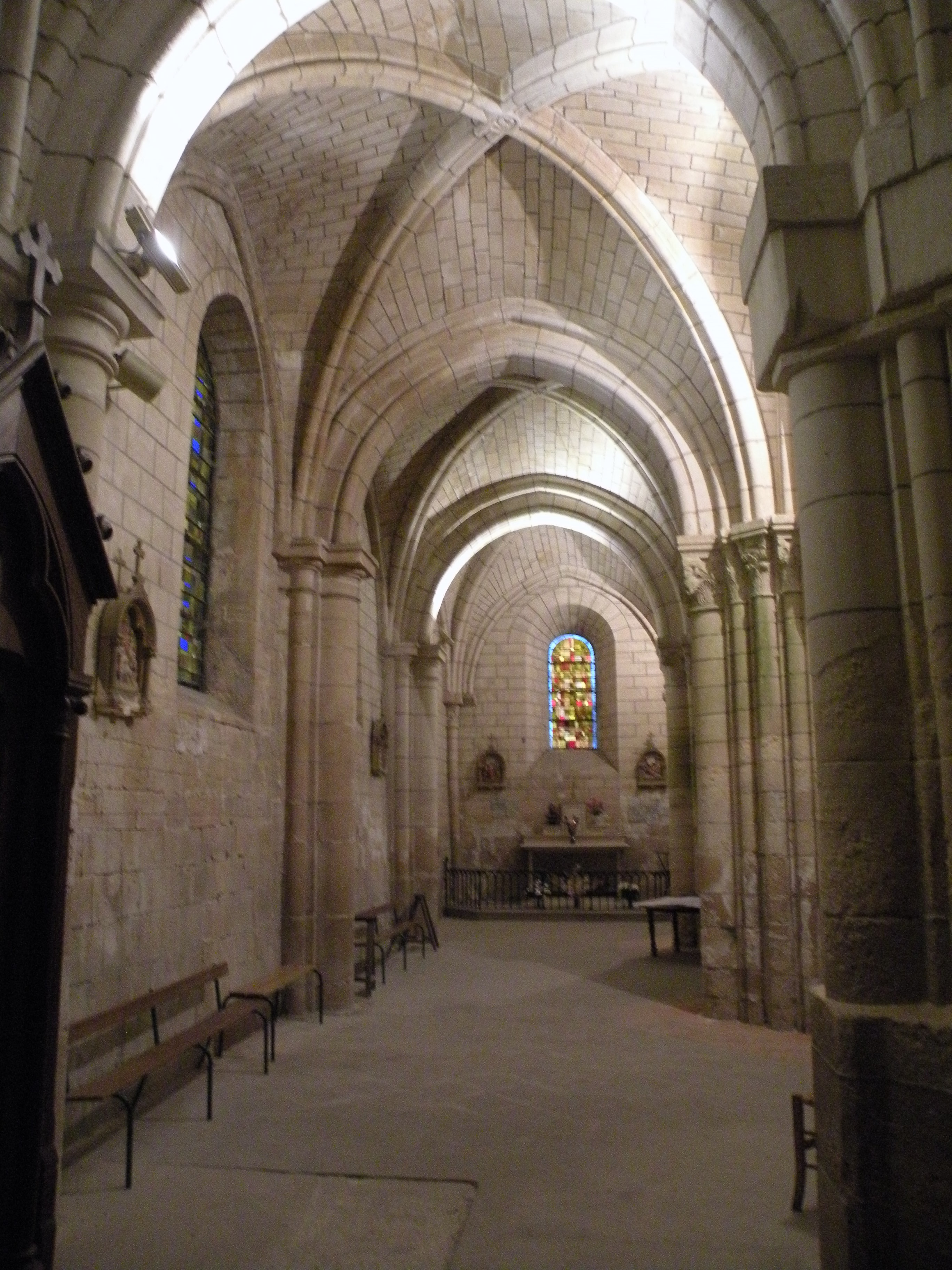 déambulatoire